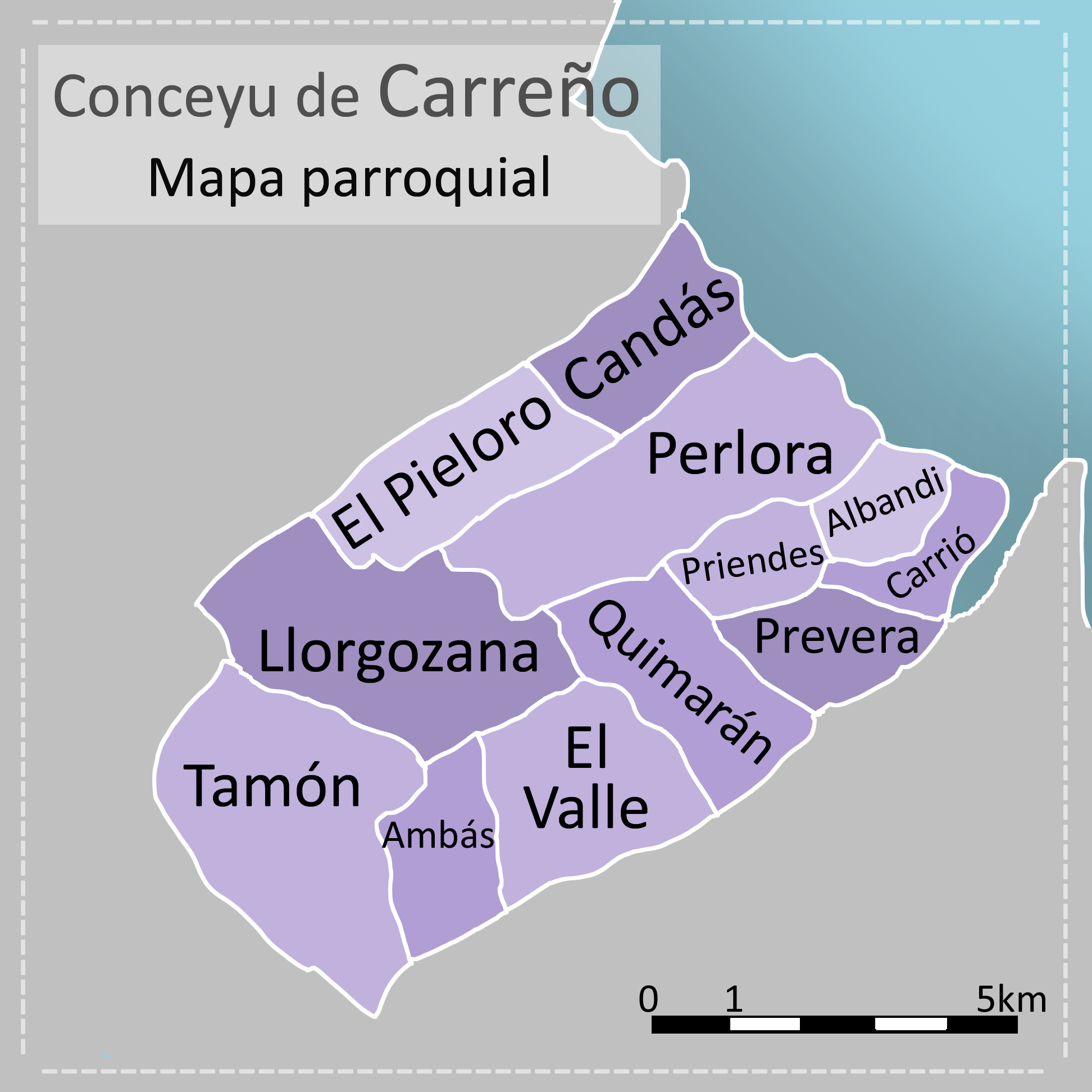 Mapa de les parroquies del conceyu de Carreño (Asturies)